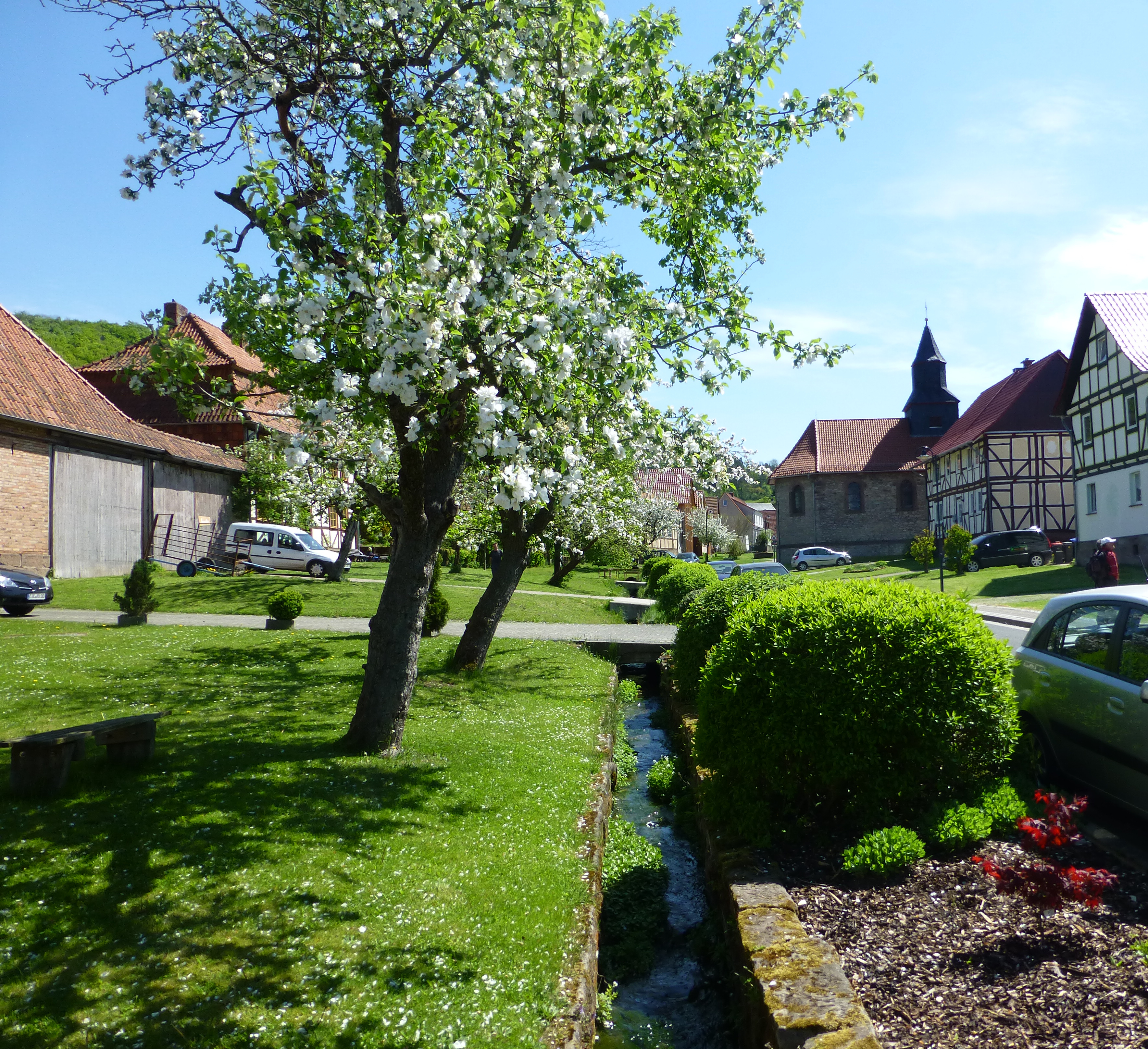 impreso de la komunumo Schönhagen en Turingio, Germanio